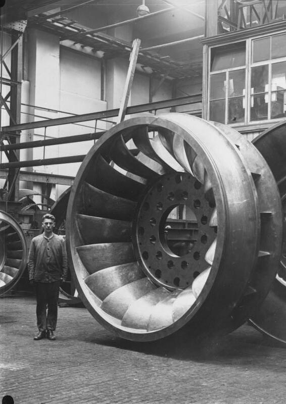 Riesen deutscher Technik! Ein Voith'sches Riesen-Wasserrad von 6.000 P.S. für das Kraftwerk Chippawa am Niagarrafall.